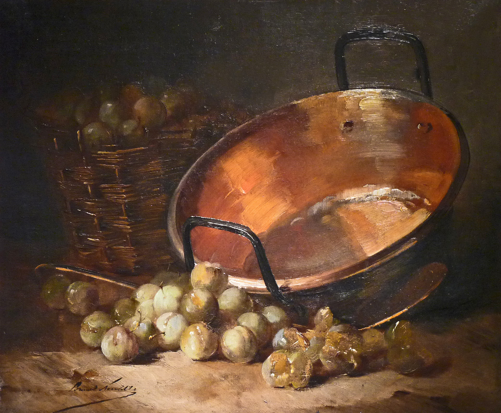 Chaudron et prunes (1905). Musée Charles de Bruyères à Remiremont.